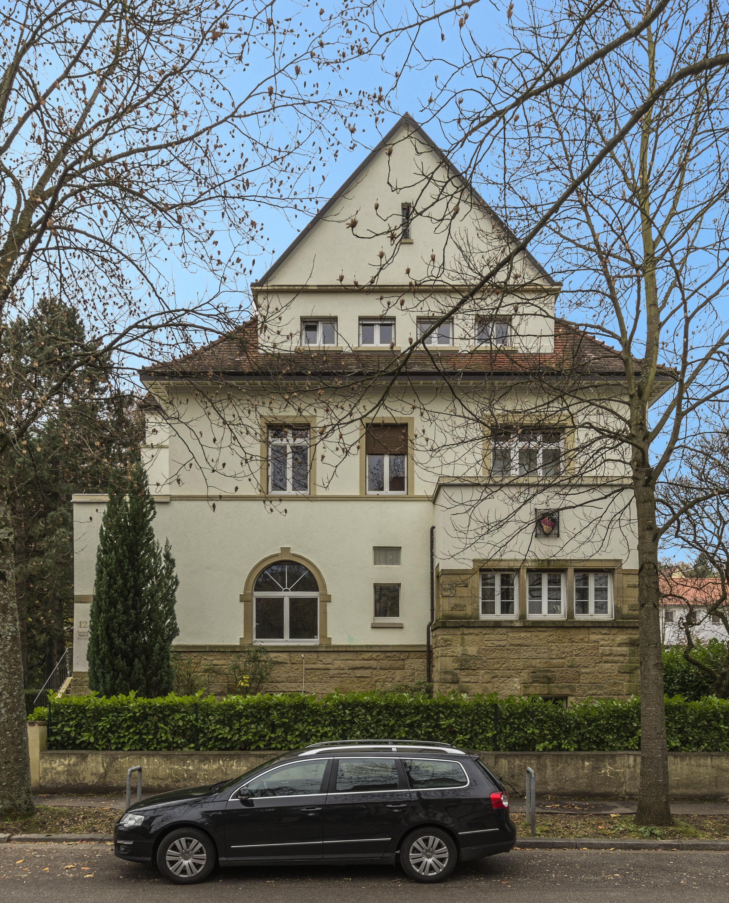 Gebäude in Freiburg im Breisgau